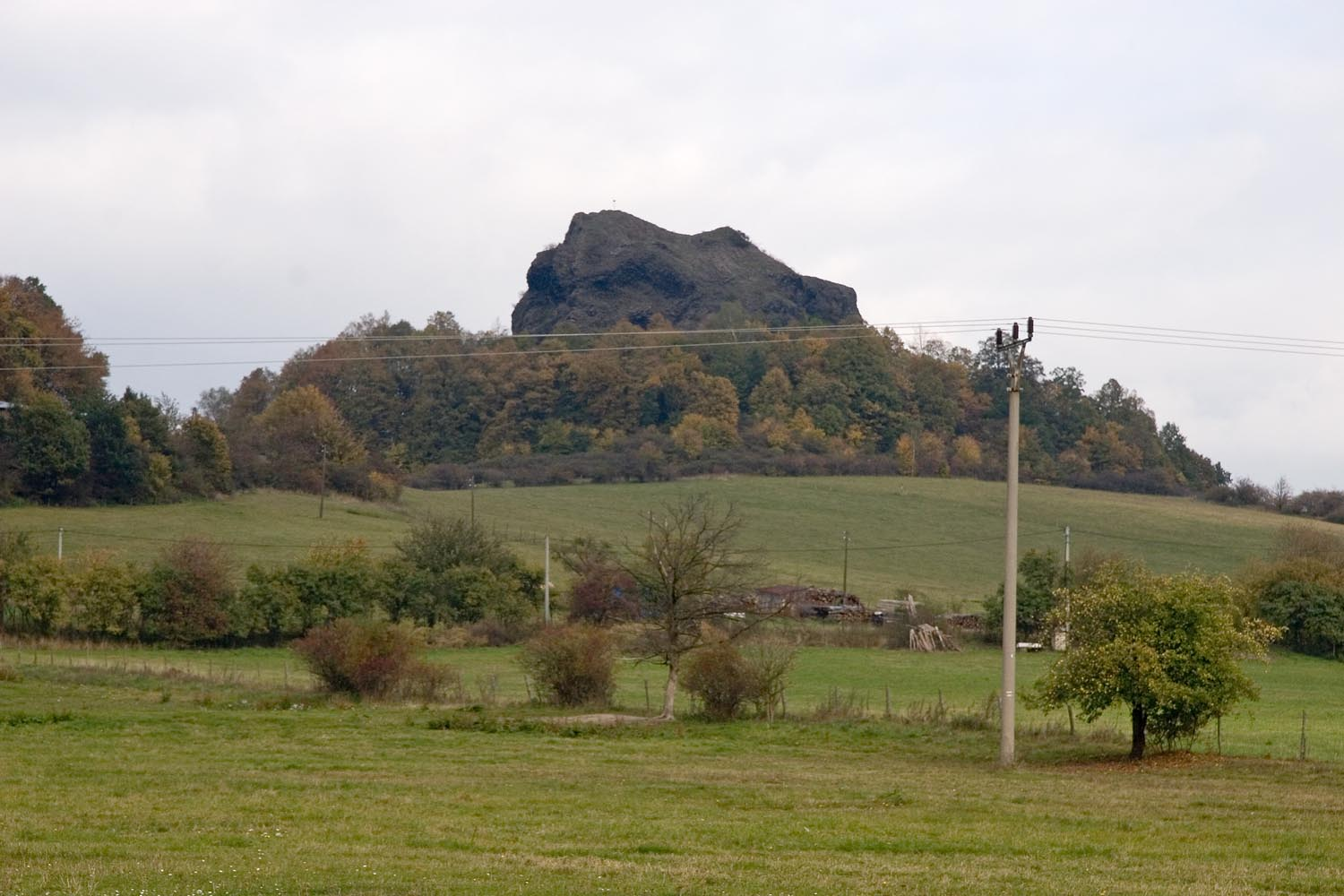 Pohled na Lysou skálu (419 m) - součást Provodínských kamenů